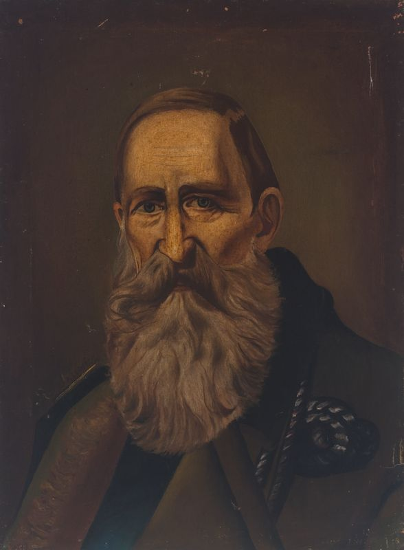 Беларуская (тарашкевіца): Партрэт Юзэфа Ігната Крашэўскага (Juzef Ihnat Krašeŭski)